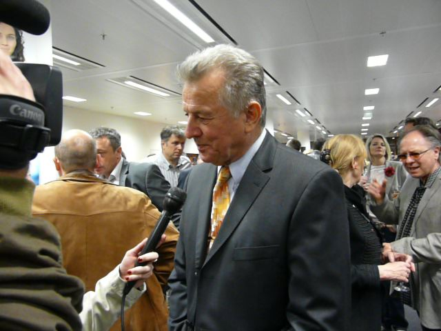 Schmitt Pál 2010. április 11-én a Fidesz kétharmados választási győzelmét ünnepli a választási központban (Budapest, Vörösmarty tér, Hálóház). A felvétel megjelent Creative Commons alatt a Metapolisz DVD sorozatban.